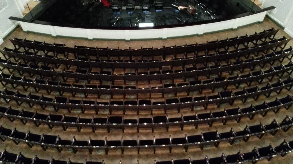 Rahvusooper Estonia teatrisaali parter